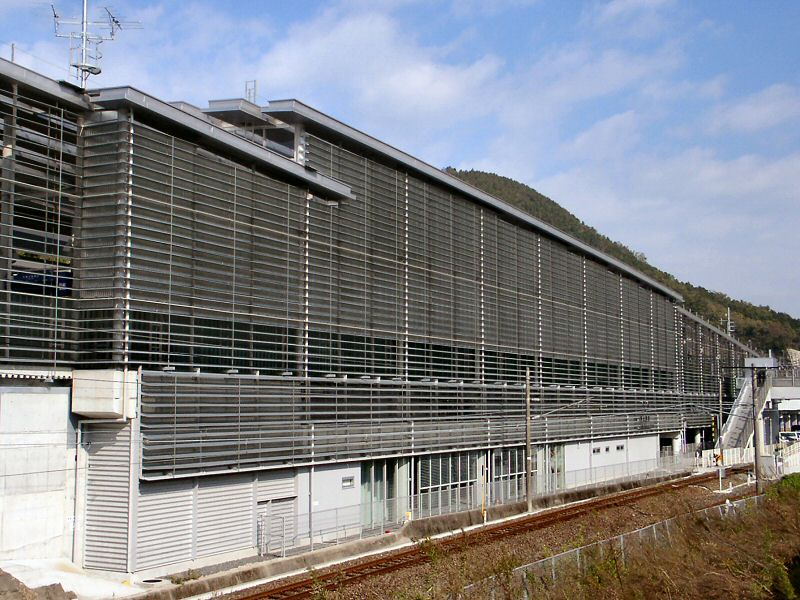 新水俣駅 外観 設計者 : 渡辺誠+西部交通建築事務所 撮影者/著者/著作権保有者 : MK Products (本人がアップロード) 撮影日 : 2004/11/23